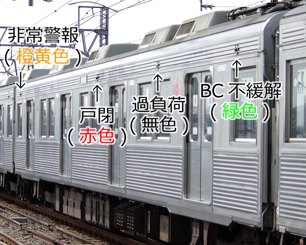 東急8000系の車側表示灯の説明